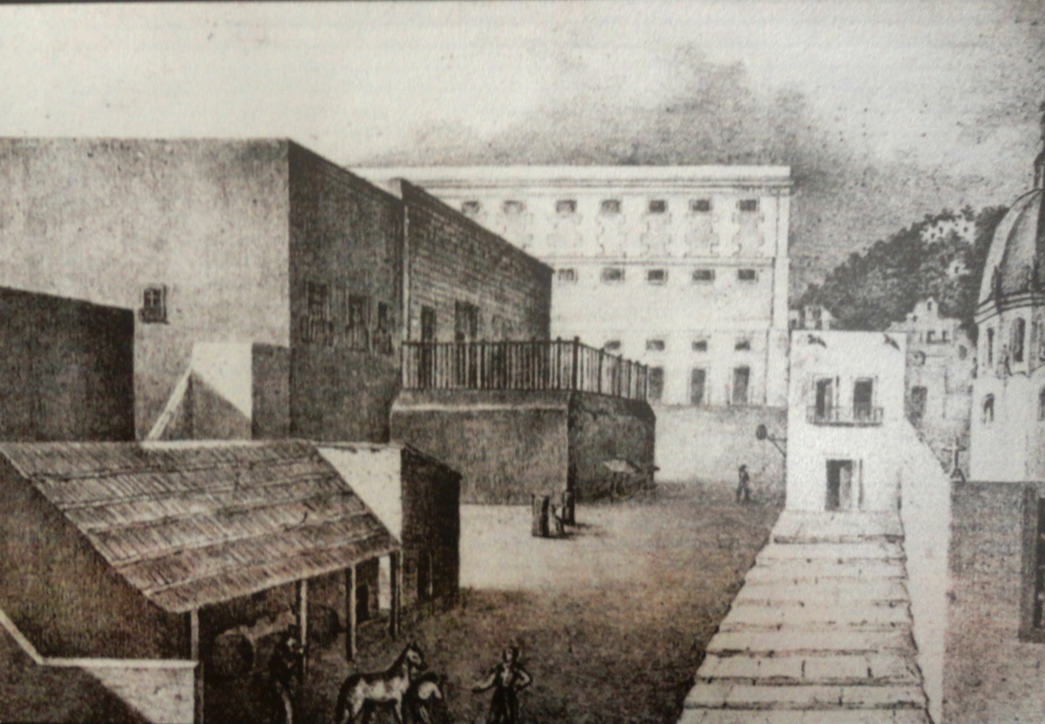 Alhóndiga de Granaditas, grabado del siglo XIX - Ciudad de Guanajuato, México. Actualmente la calle se llama Cuesta de Mendizábal.